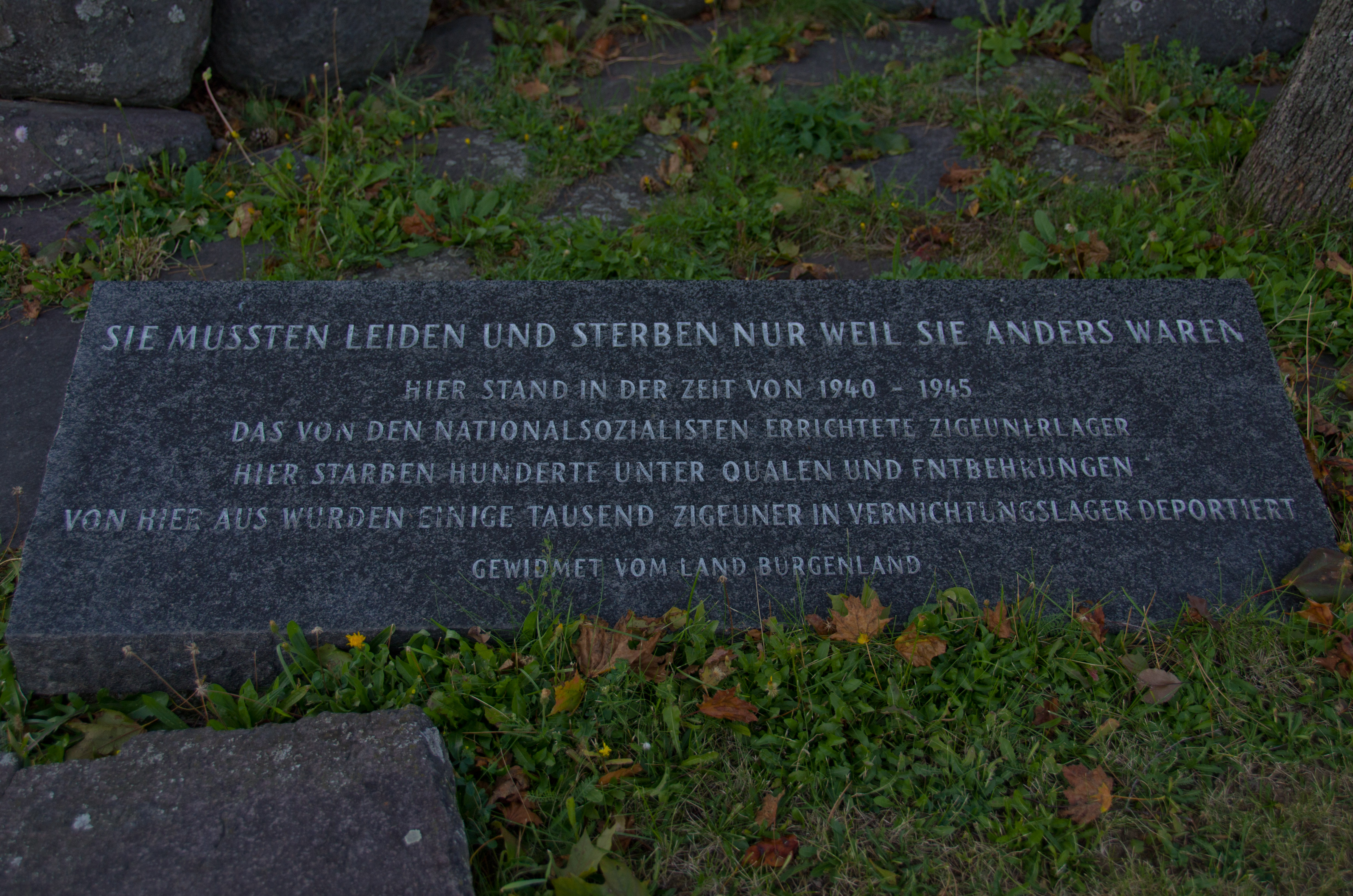 Zigeunermahnmal